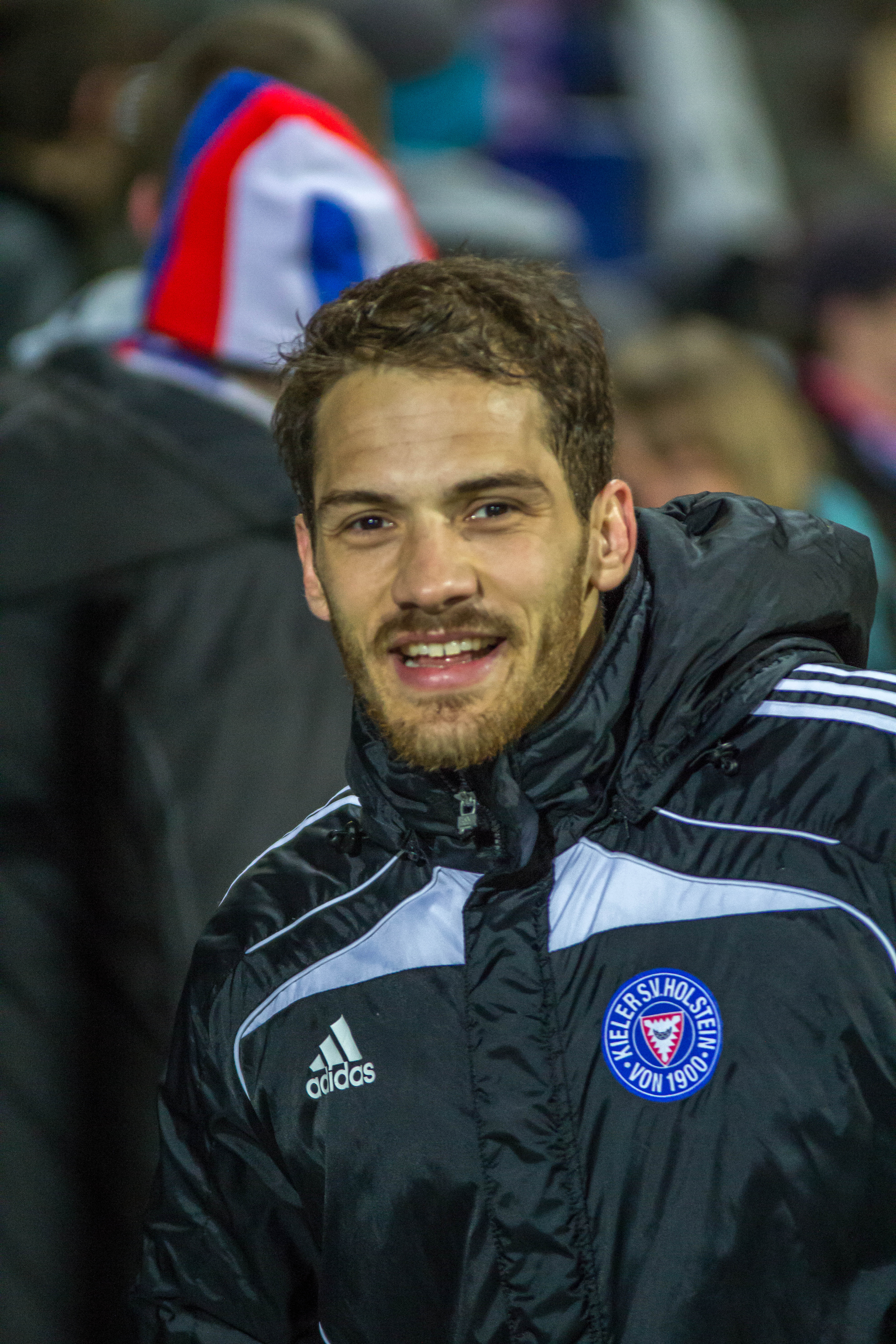 Manuel Hartmann